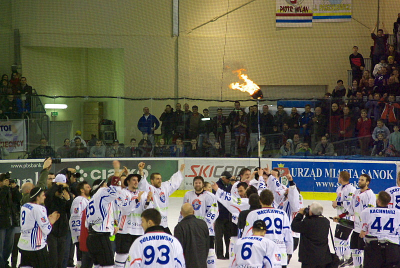 Zawodnicy Ciarko PBS Bank Sanok po zdobyciu Mistrzostwa Polski w hokeju na lodzie 2011/2012 i płonący kaszkiet trenera Marka Ziętary (Arena Sanok, 14 marca 2012)